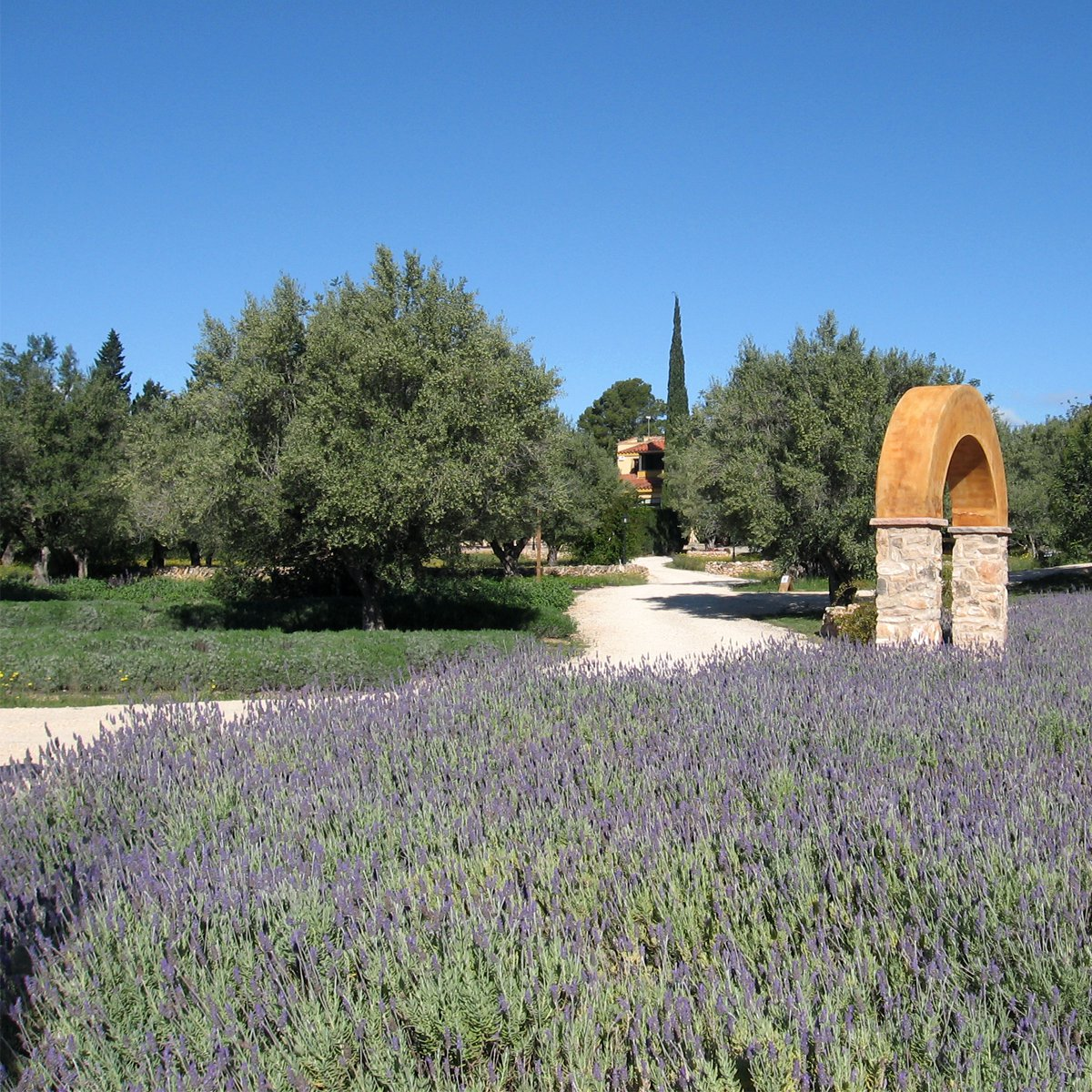 Entrada Jardín.